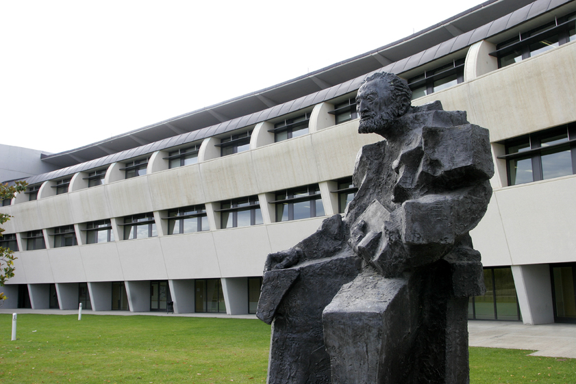 fotografía del campus de Colmenarejo de la uc3m